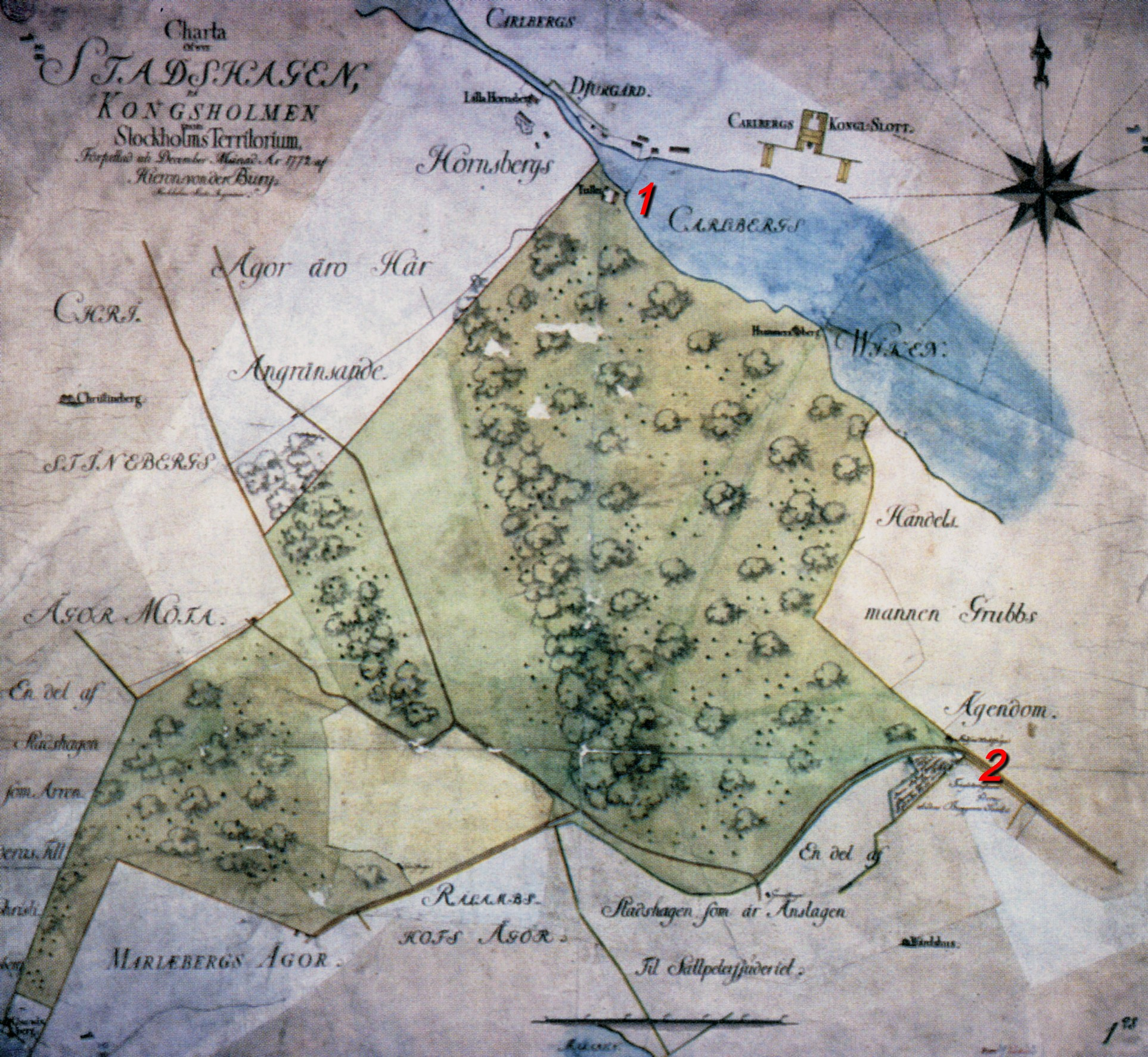 "Charata öfver Stadshagen Kongsholmen" (nr. 1 avser Västra sjötullen, nr. 2 avser Kungsholmstullen).